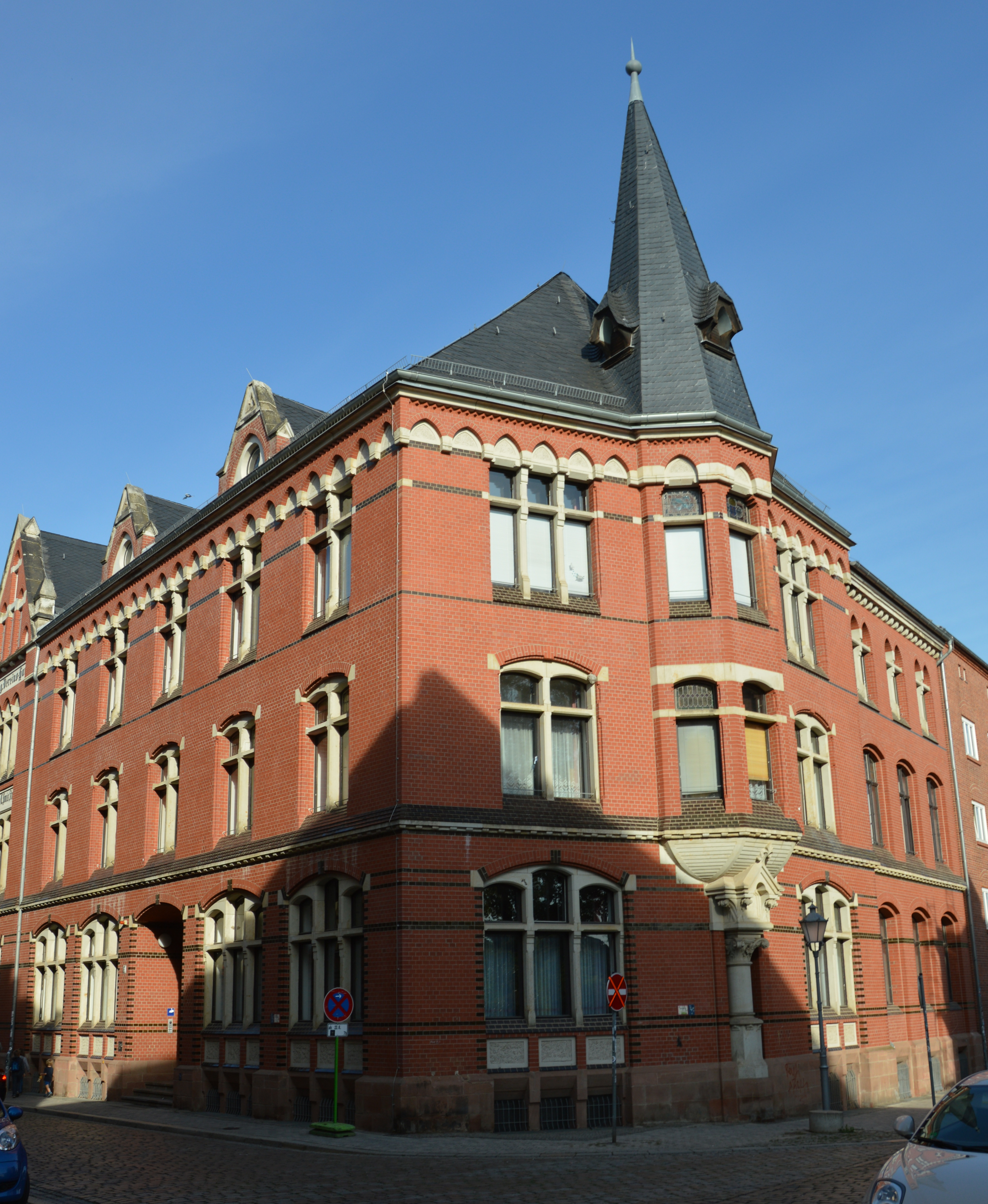 Gebäude der Strube'schen Stiftung (Evangelisches Vereinshaus) in Magdeburg-Buckau, Basedowstraße 15/17 / Klosterbergestraße; erbaut 1890-1892; unter Denkmalschutz